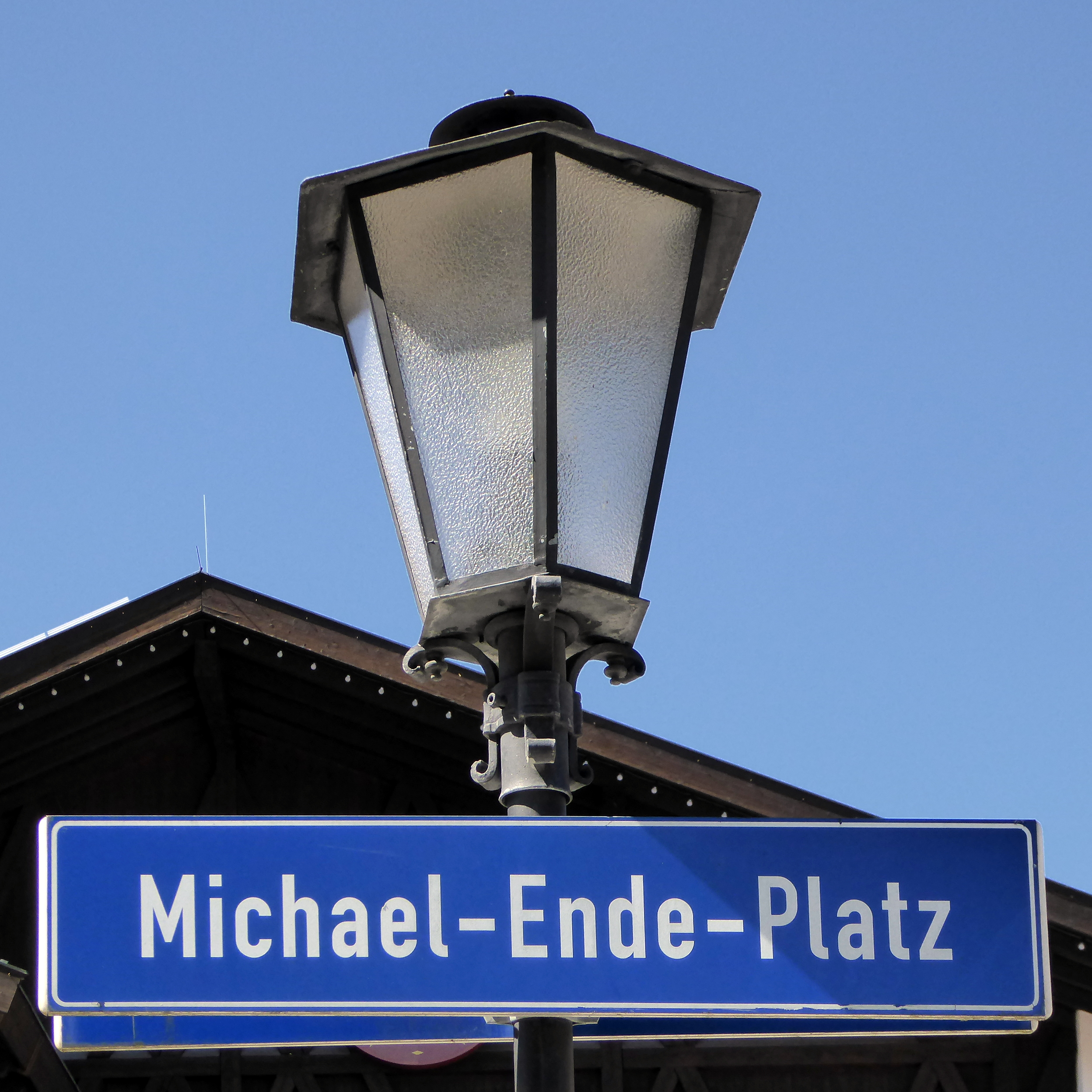 Garmisch, Schild „Michael-Ende-Platz“.